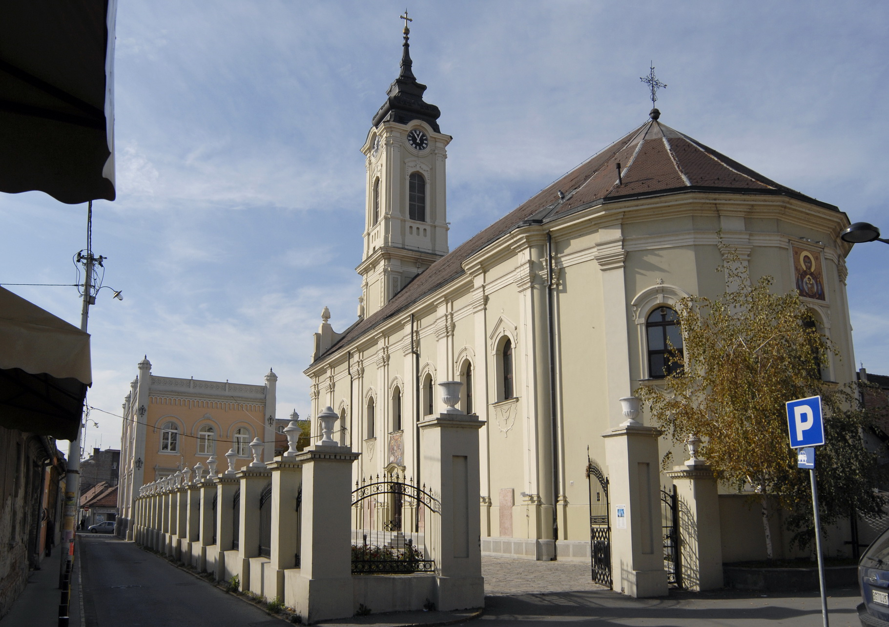 Autor by Snežana Negovanović